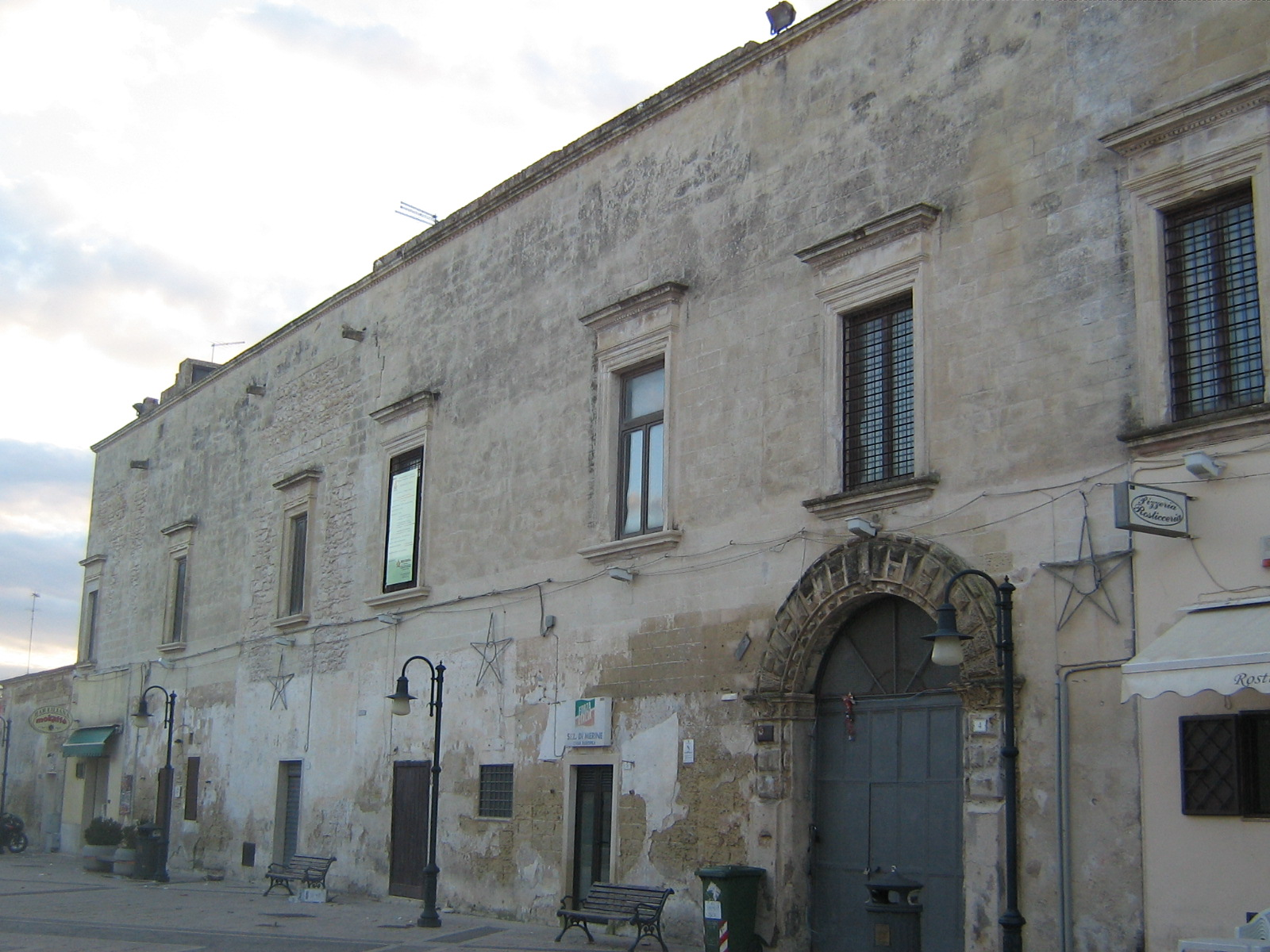 Palazzo baronale di Merine